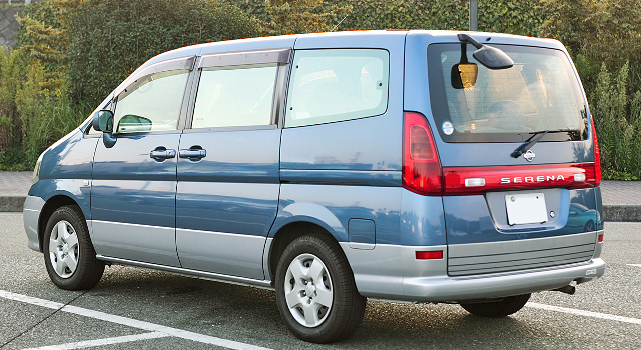 Nissan Serena C24 (1999-6 ~ 2000-5)